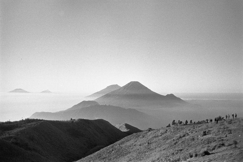 Gunung Sindoro & Sumbing dari camp area gunung Prau, dieng Wonosobo. Minolta x300, 28mm f2 vivitar + fuji across100 (processed Hipercat lab)